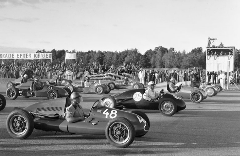 Skarpnäcksfältet. Motortävlingen "Skarpnäcksloppet". Bilar vid startlinjen.